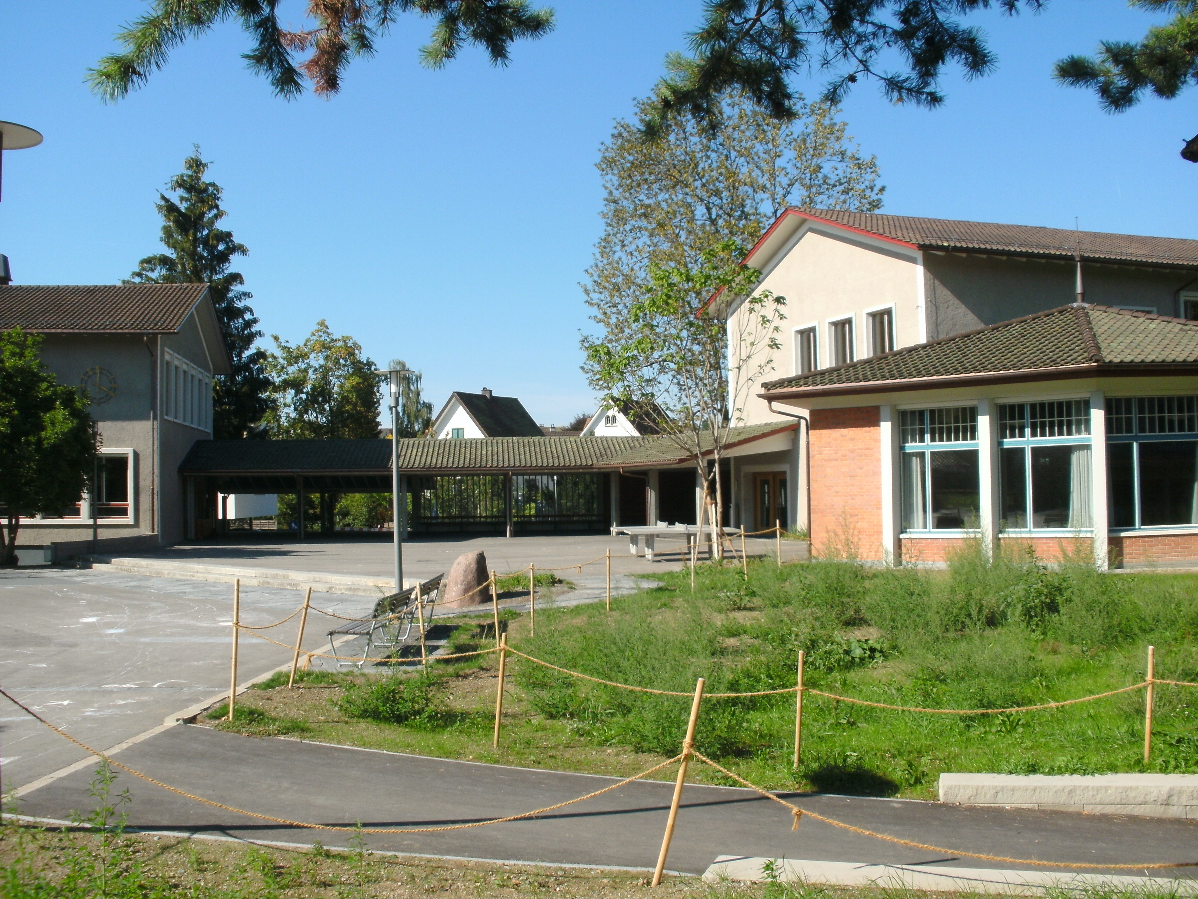 Schulhaus Brunnenmoos in Kilchberg ZH, Schweiz, Schulhaustrakt A und Singsaal